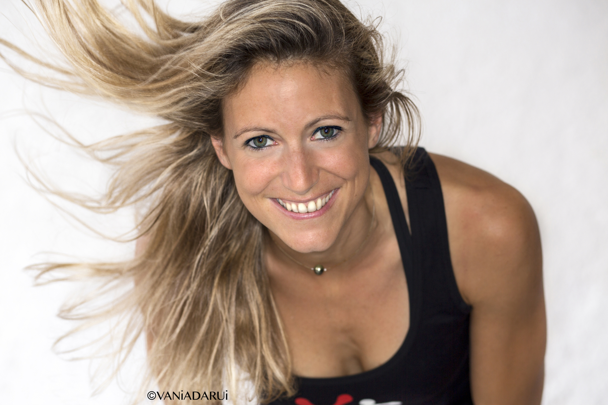 Karine Joly